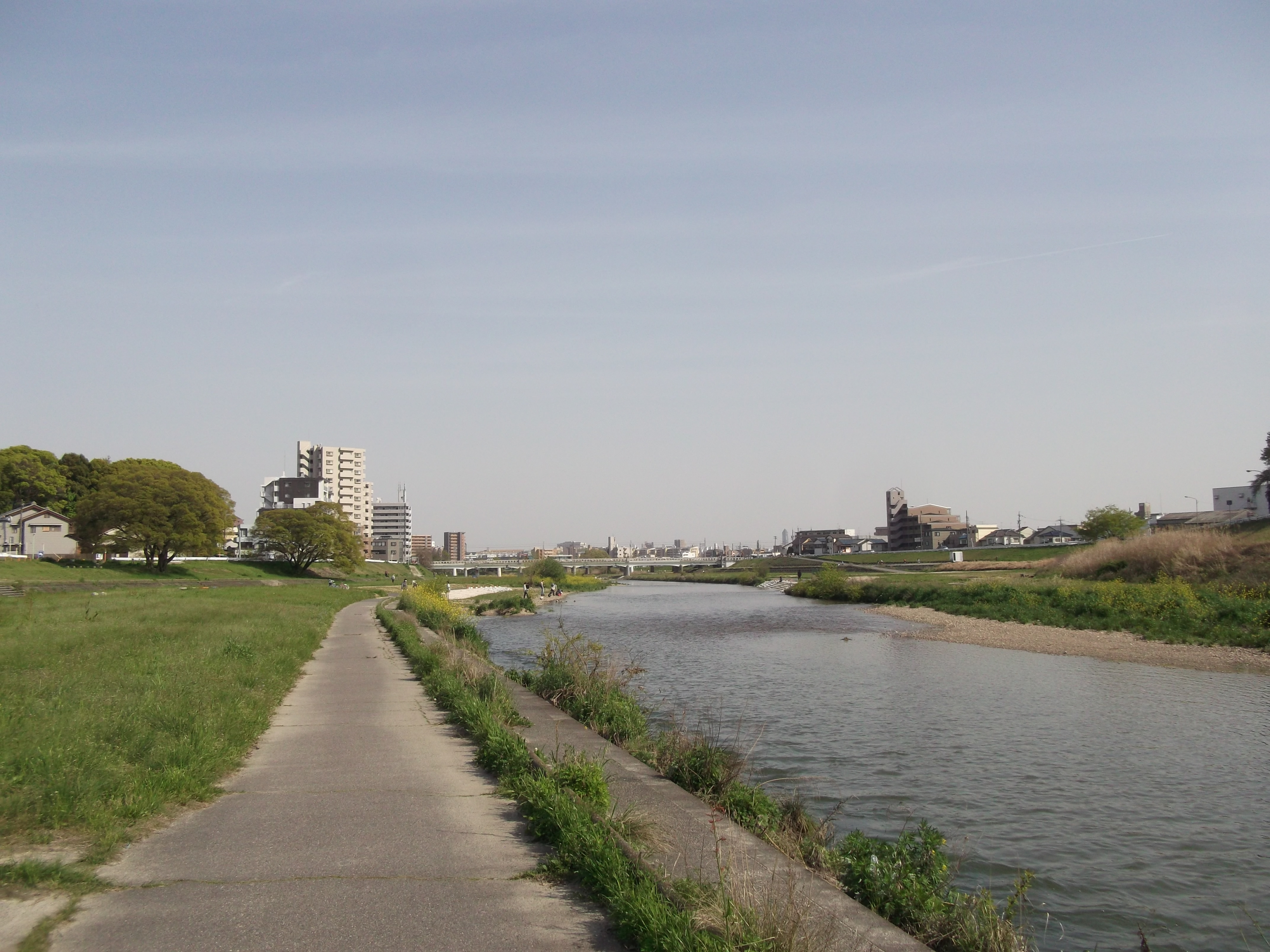 名古屋市守山区・北区の矢田川橋緑地を北西側から南東側に向かって撮影